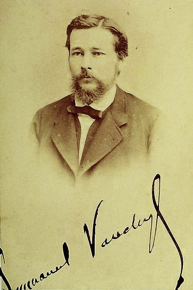 Portrait photographique et signature d'Emmanuel Vauchez (vers 1885). Photographe inconnu.